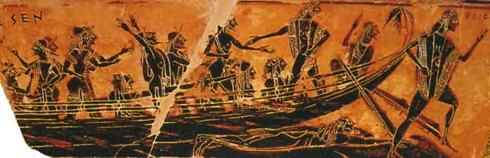 Triakontera